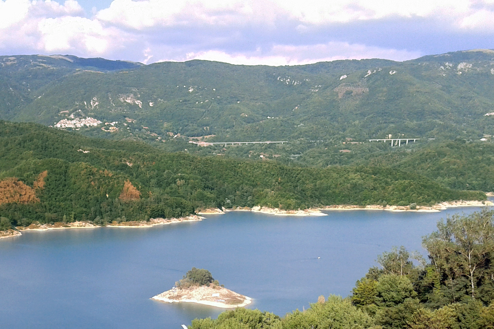 La strada regionale 578 Salto-Cicolana o superstrada Rieti-Torano fotografata da Rocca Vittiana, frazione di Varco Sabino (provincia di Rieti) con in primo piano il Lago del Salto e a sinistra il paese di Petrella Salto